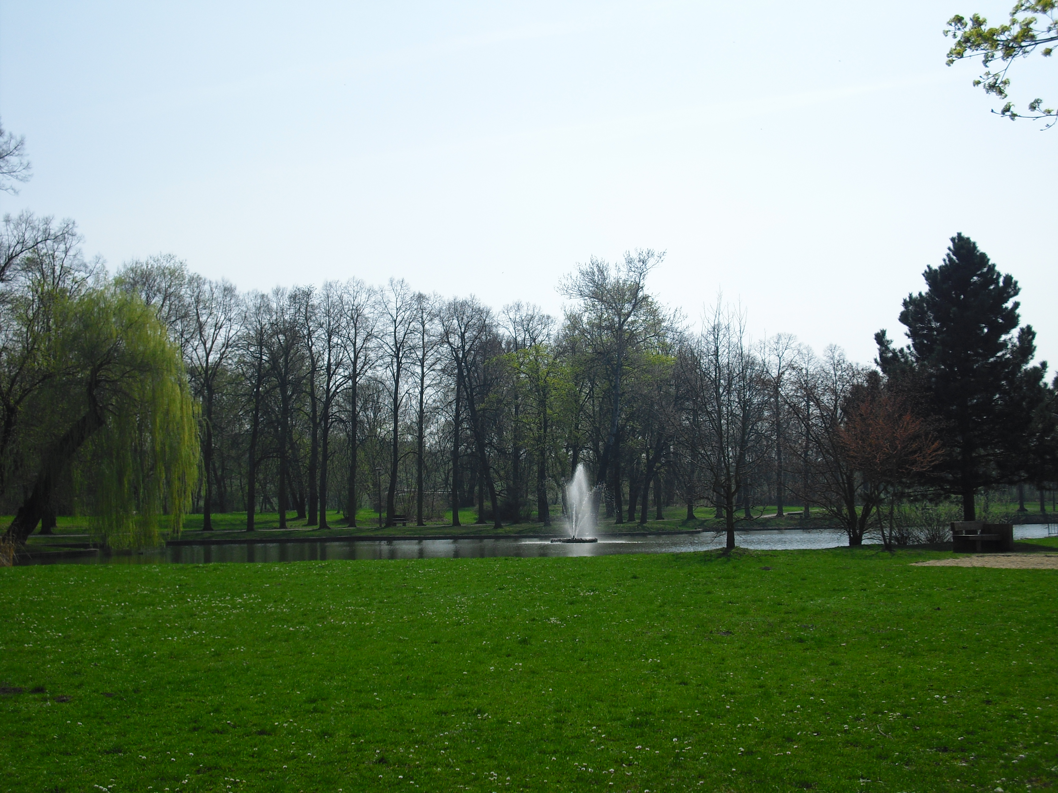 Herressener Promenade 2